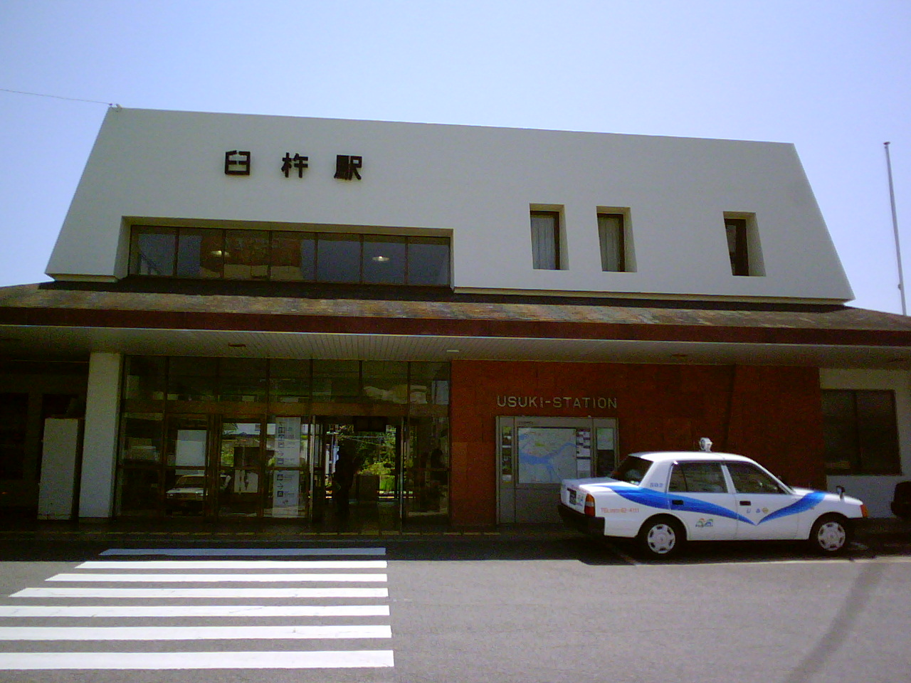 JR日豊本線臼杵駅駅舎